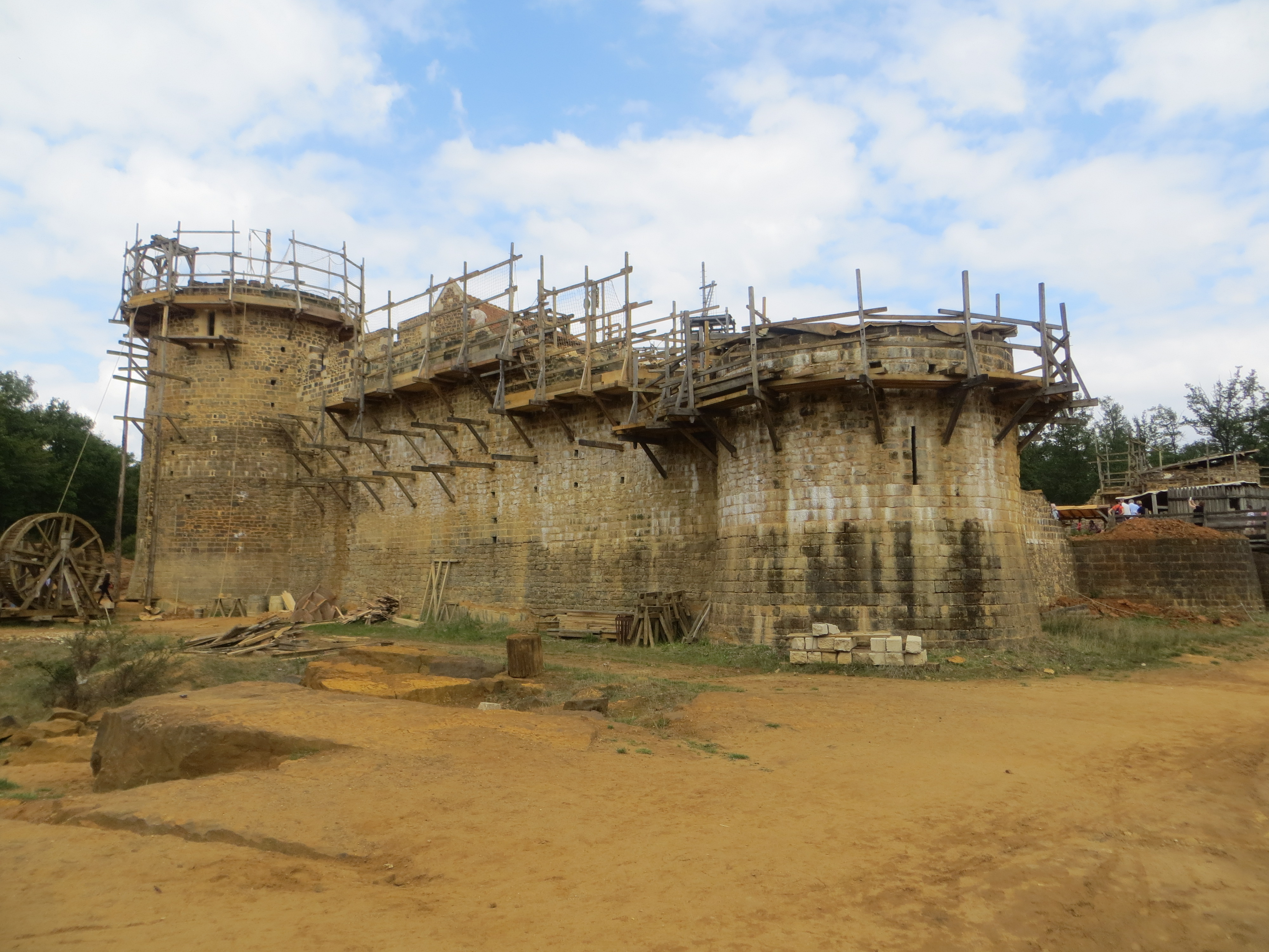 Le château de Guédelon, le 16 août 2015.